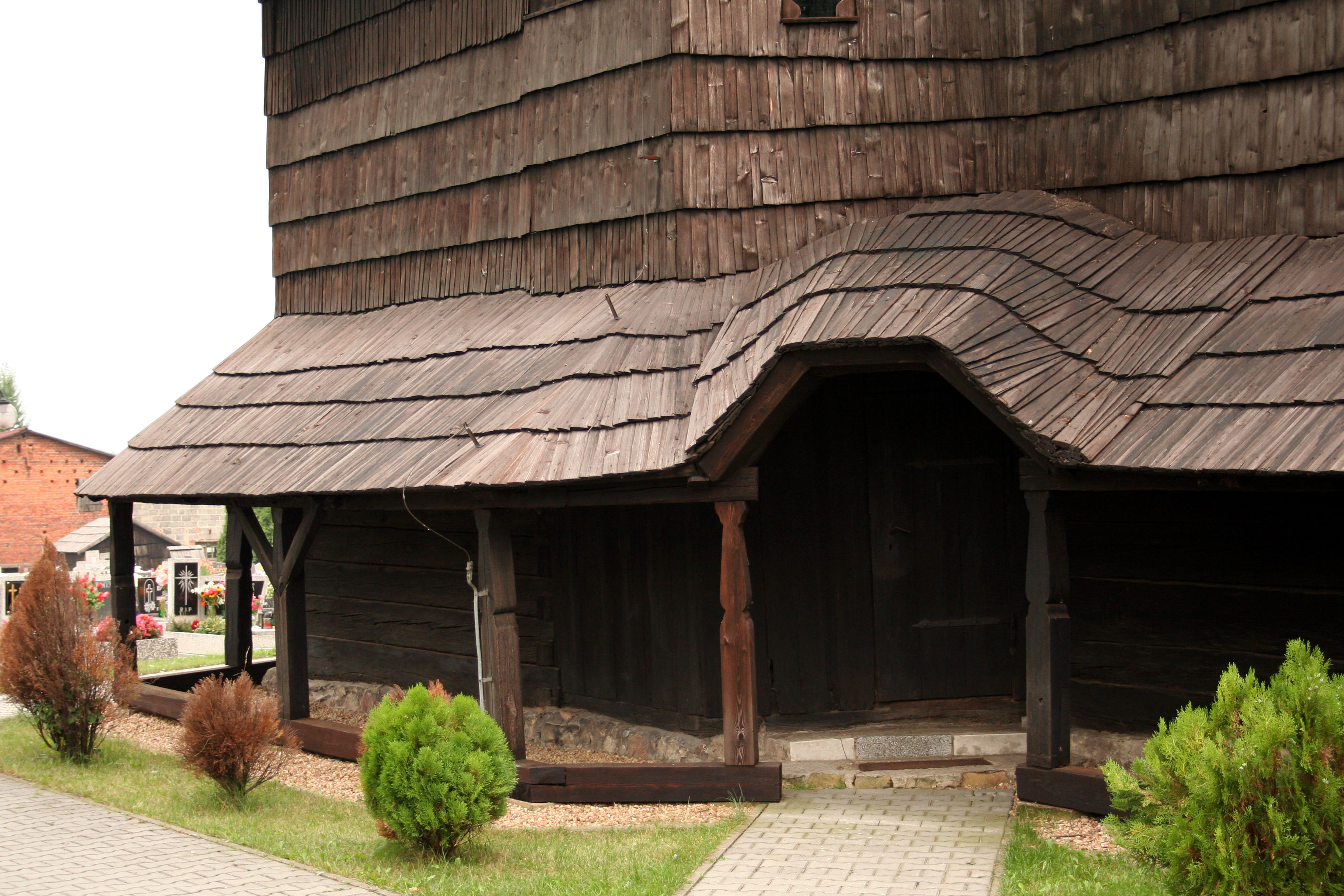 soboty przy kościele św. Marcina w Cieszowej, powiat lubliniecki